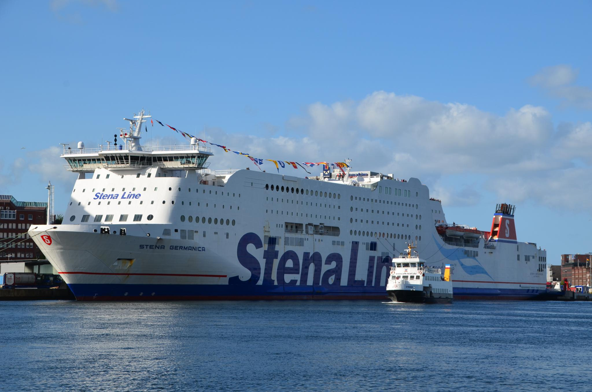 Kieler Woche 2013